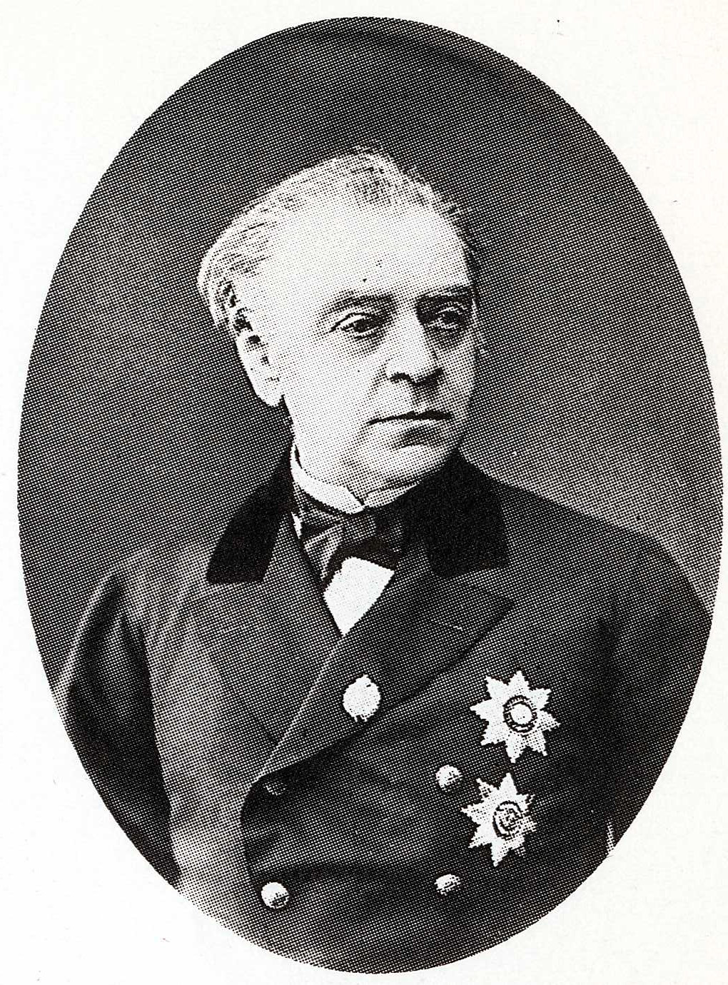 Ministerivaltiosihteeri Emil Stjernvall-Walleen (1806–1890), kuvattu Pietarissa 1870-luvun lopulla.